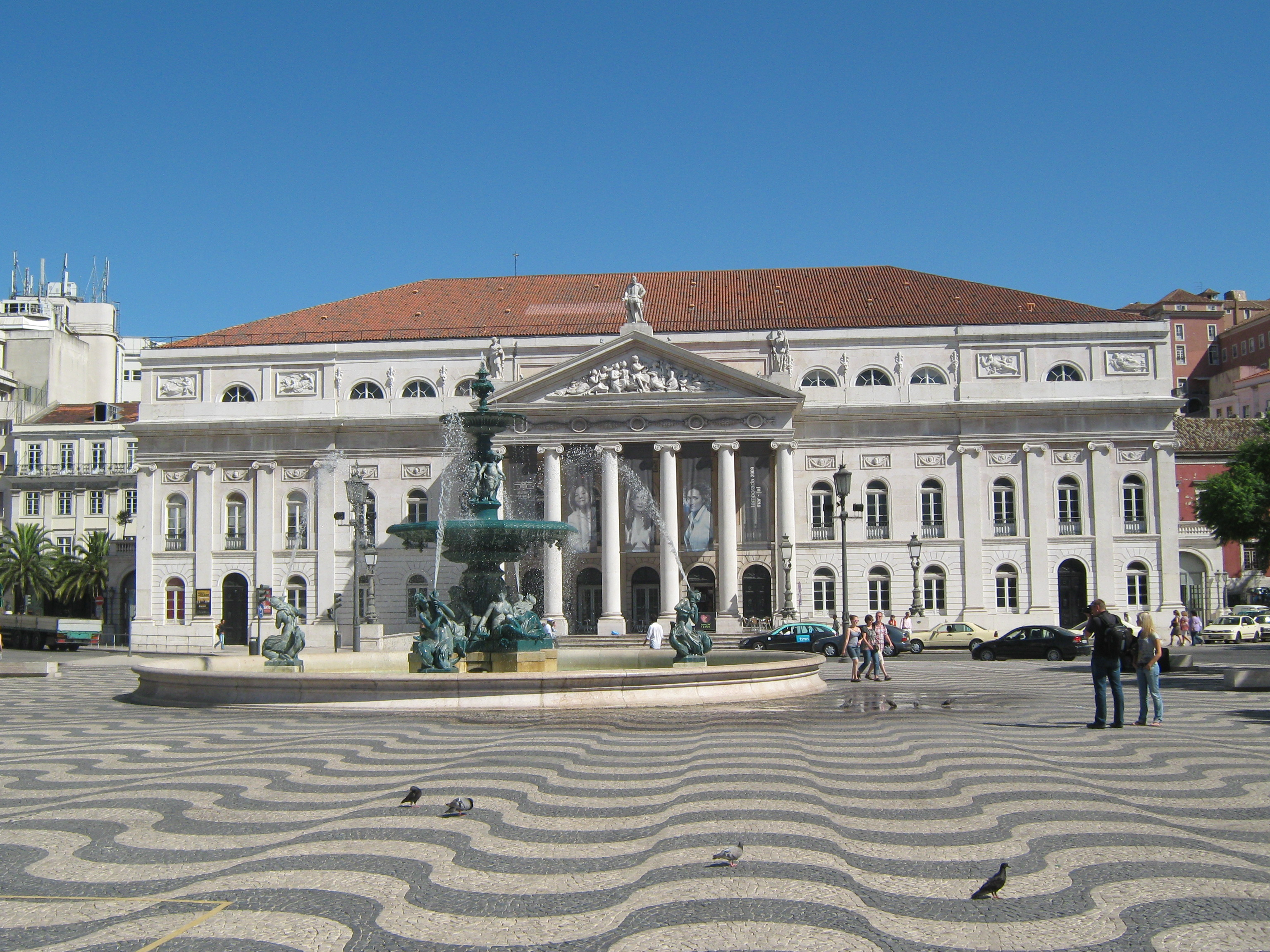 Rossio